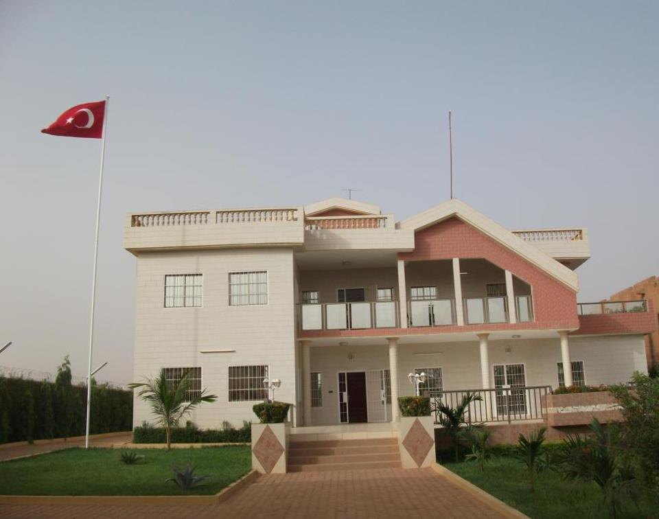 ambassade Turque